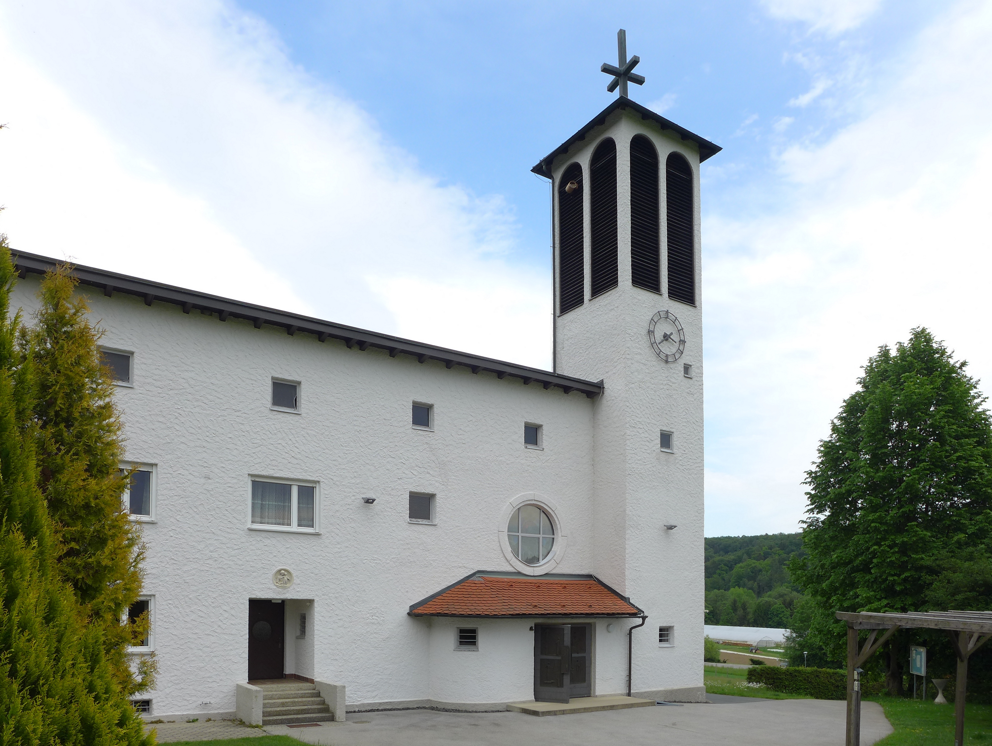 Autaler Kirche, Außenansicht (2020)